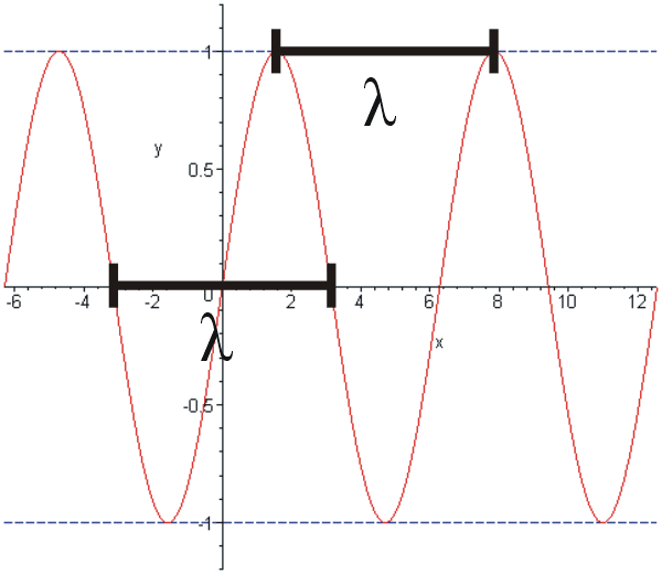 Darstellung der Wellenlänge an einer Sinusfunktion